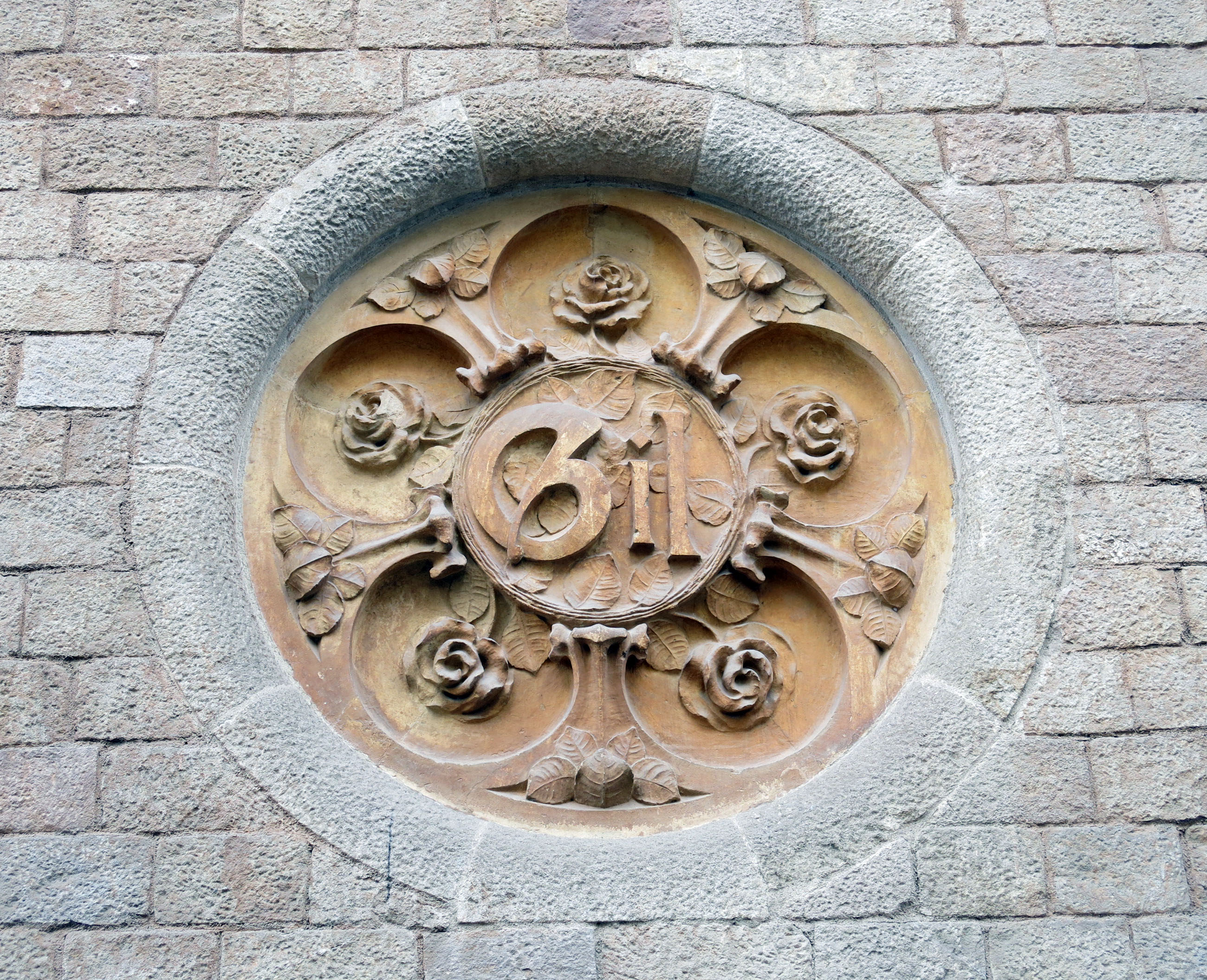 Hospital de la Santa Creu i Sant Pau (Barcelona)